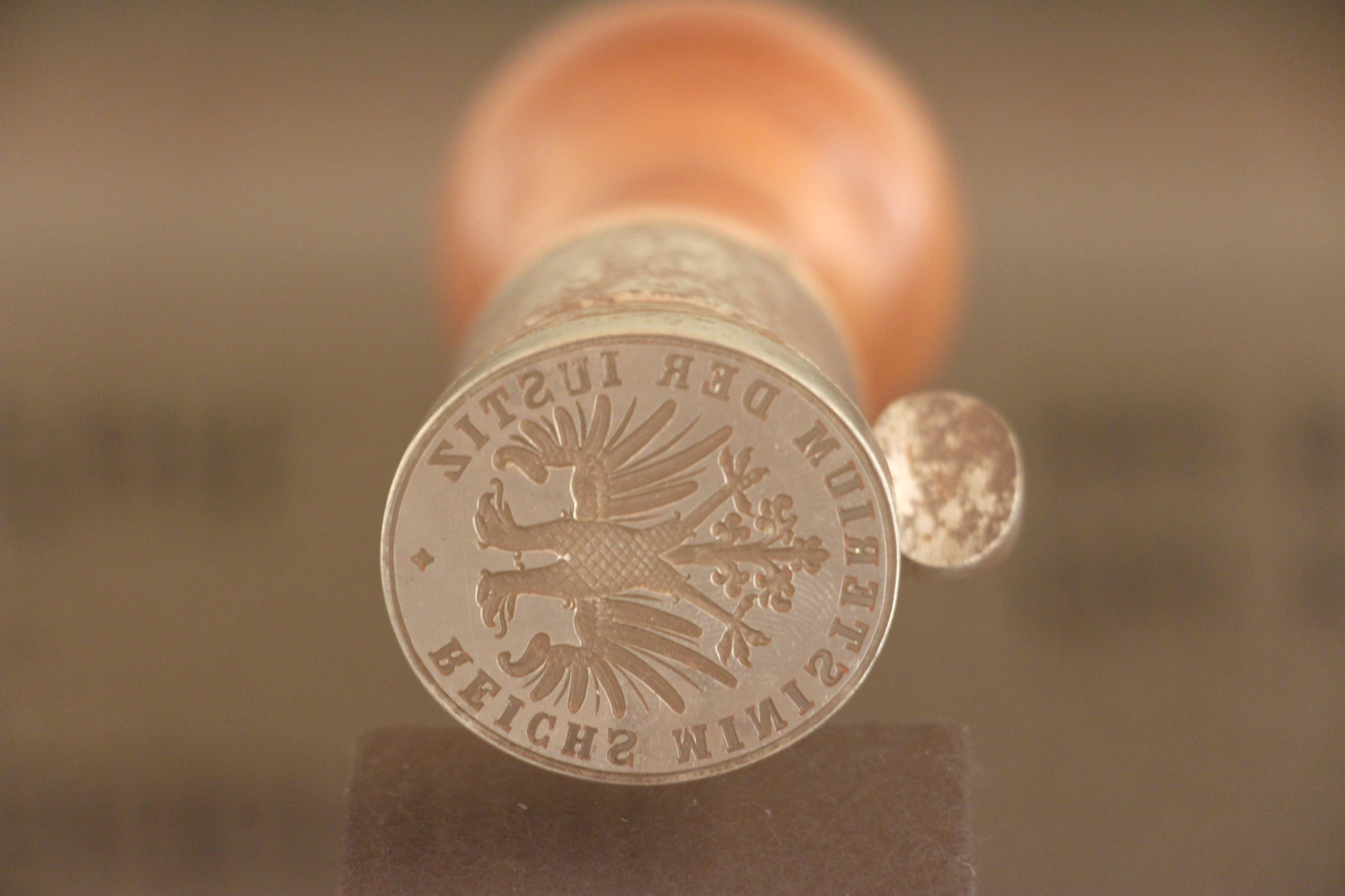 Erinnerungsstätte für die Freiheitsbewegungen in der deutschen Geschichte. Stempel: Reichs Ministerium der Justiz.